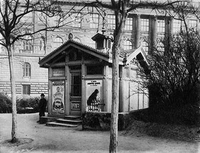 V období od roku 1902 do 1915 systematicky vytvářel obrazovou dokumentaci Prahy.